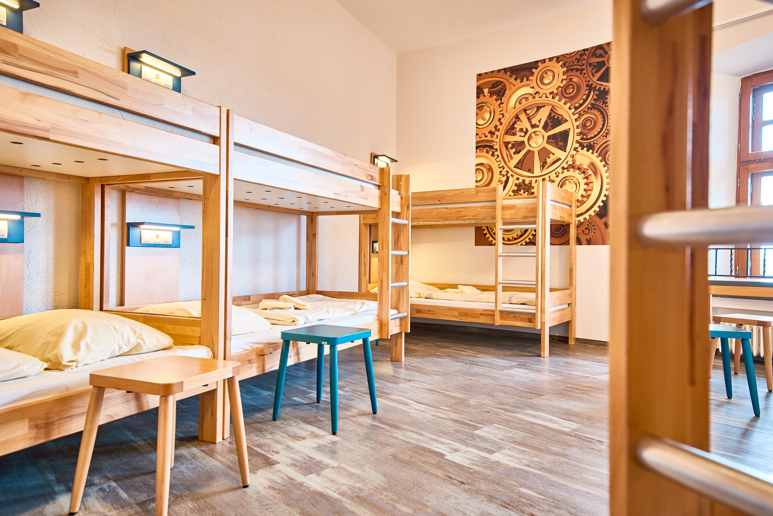 Modernisiertes Zimmer in der DJH Jugendherberge in der Wewelsburg bei Paderborn.